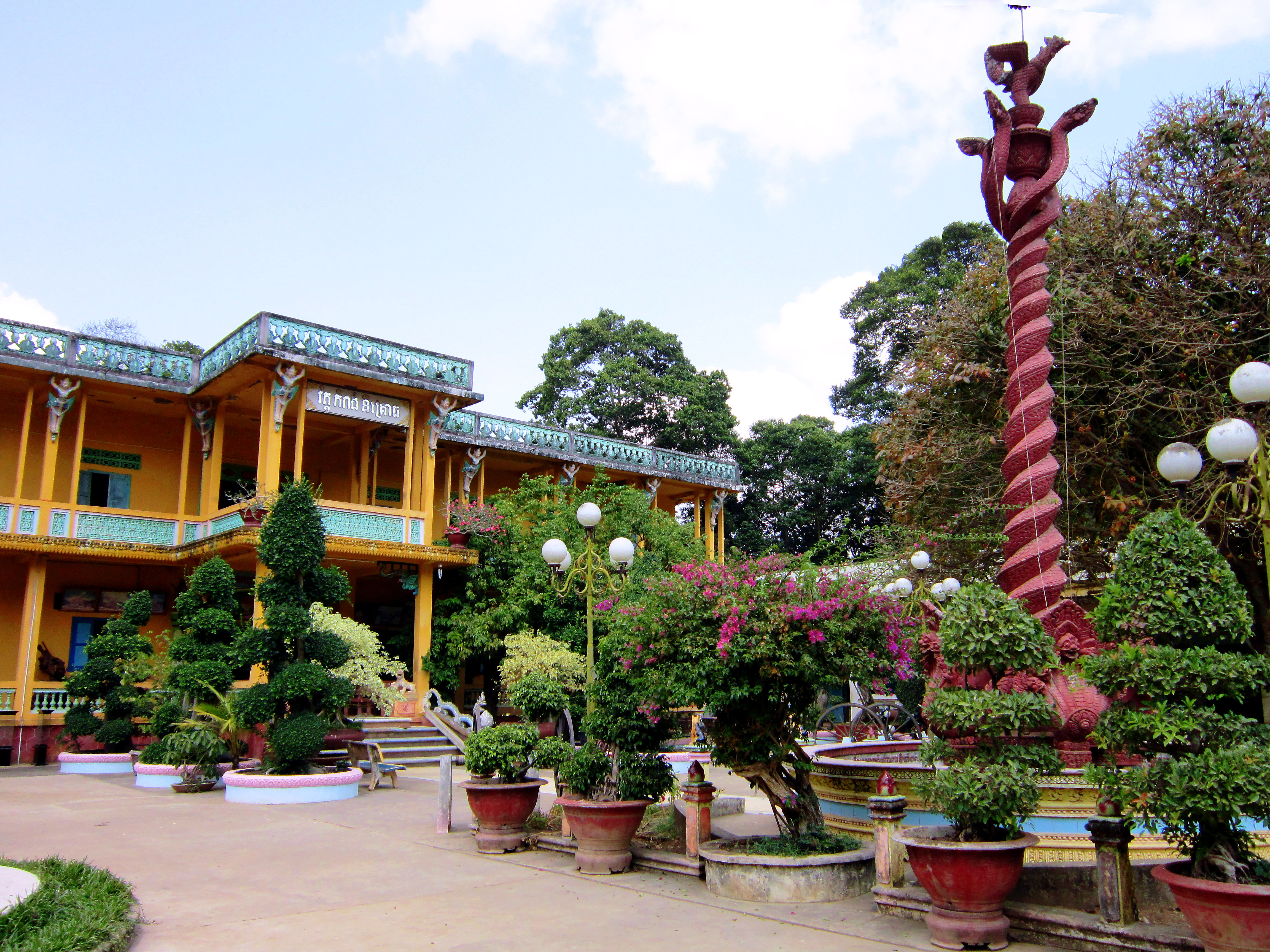 Nhà trưng bày tác phẩm điêu khắc gỗ ở chùa Hang (Trà Vinh, Việt Nam).